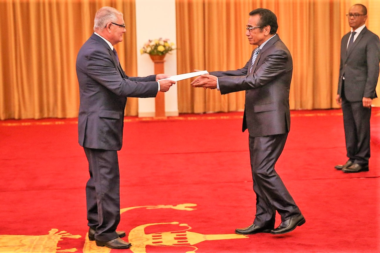 Omar Lauro Marreto Betancourt übergibt an Francisco Guterres seine Akkreditierung. Im Hintergrund Außenminister Dionísio Babo Soares